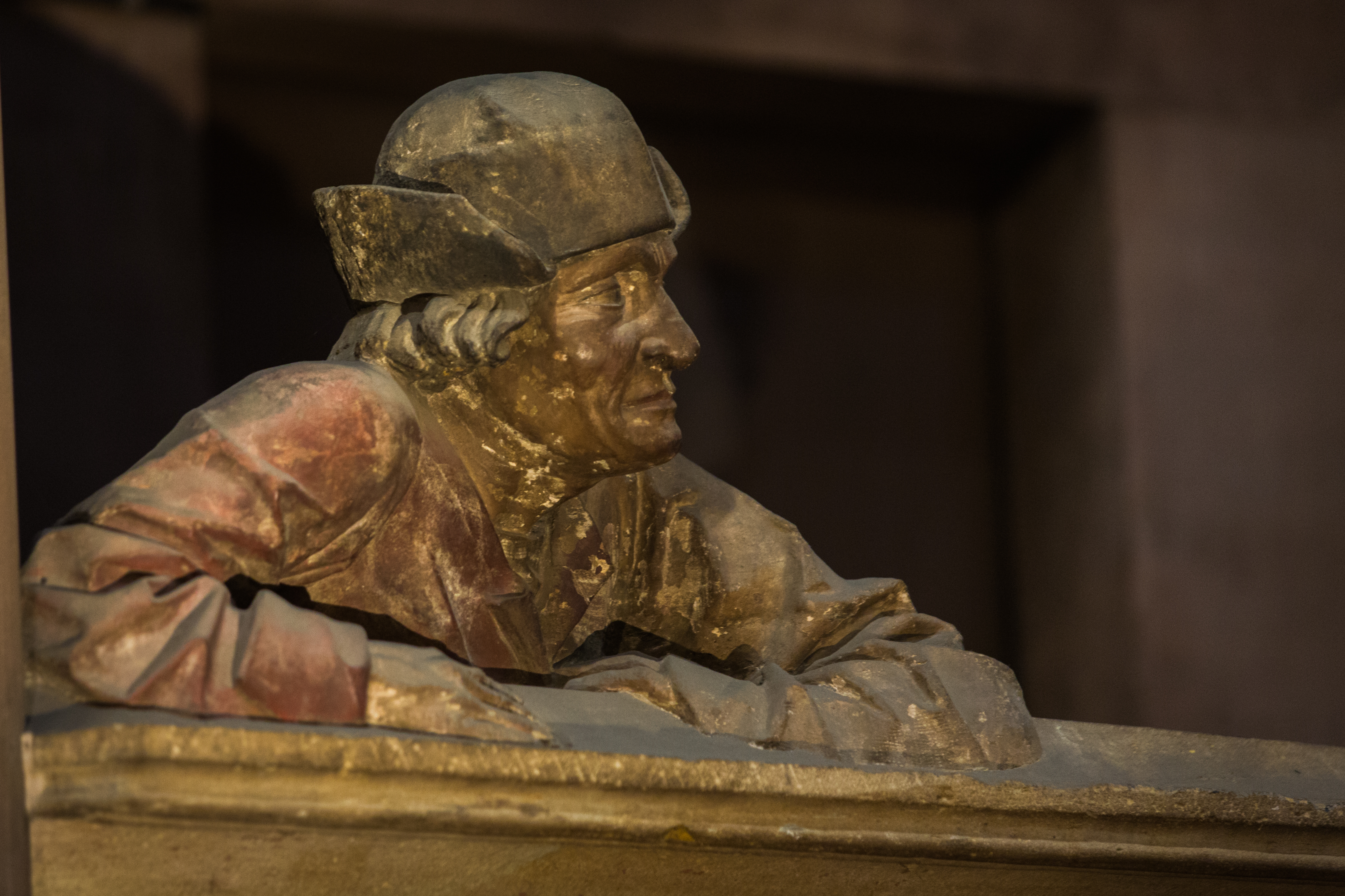 Statue d'un homme, accoudé à une balustrade. La légende raconte qu'il s'agit d'un architecte concurrent de celui ayant construit le pilier des Anges, prouesse architecturale de l'époque. Il aurait prétendu que jamais un seul pilier ne pourrait soutenir une si grande voûte et attendrait pour voir le tout s'effondrer. .